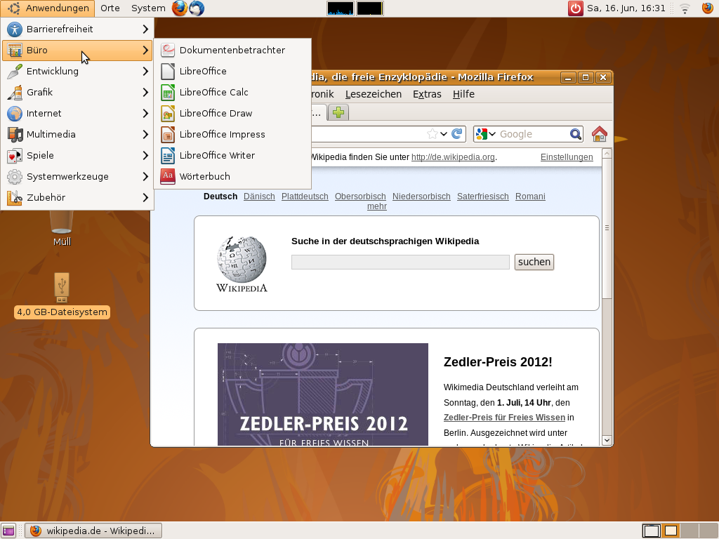 Screenshot des MATE-Desktops unter Ubuntu 12.04